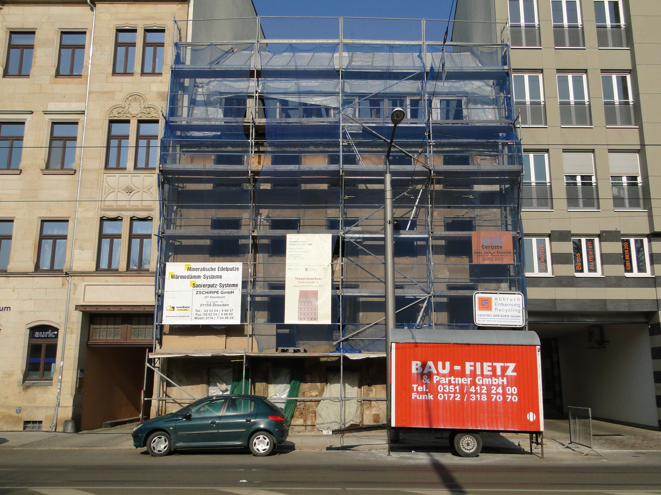 Friedrichstraße 26, Dresden